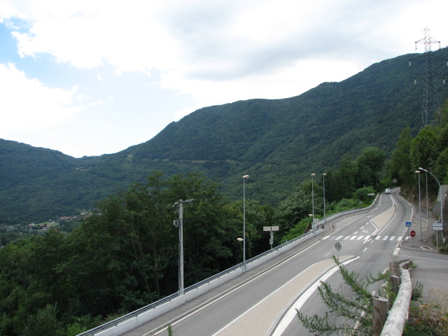 Vue générale de la descente de Laffrey, depuis l'embranchement vers le village de Notre-Dame de Mésage (le dernier quart de la descente après cette bifurcation n'est pas visible)